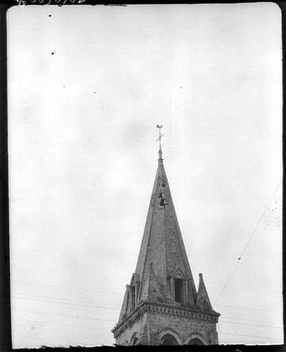 Prise de vue du clocher de l'église Notre-Dame-de-l'Assomption de La Ferté-Alais (91) après le coup de foudre en 1915